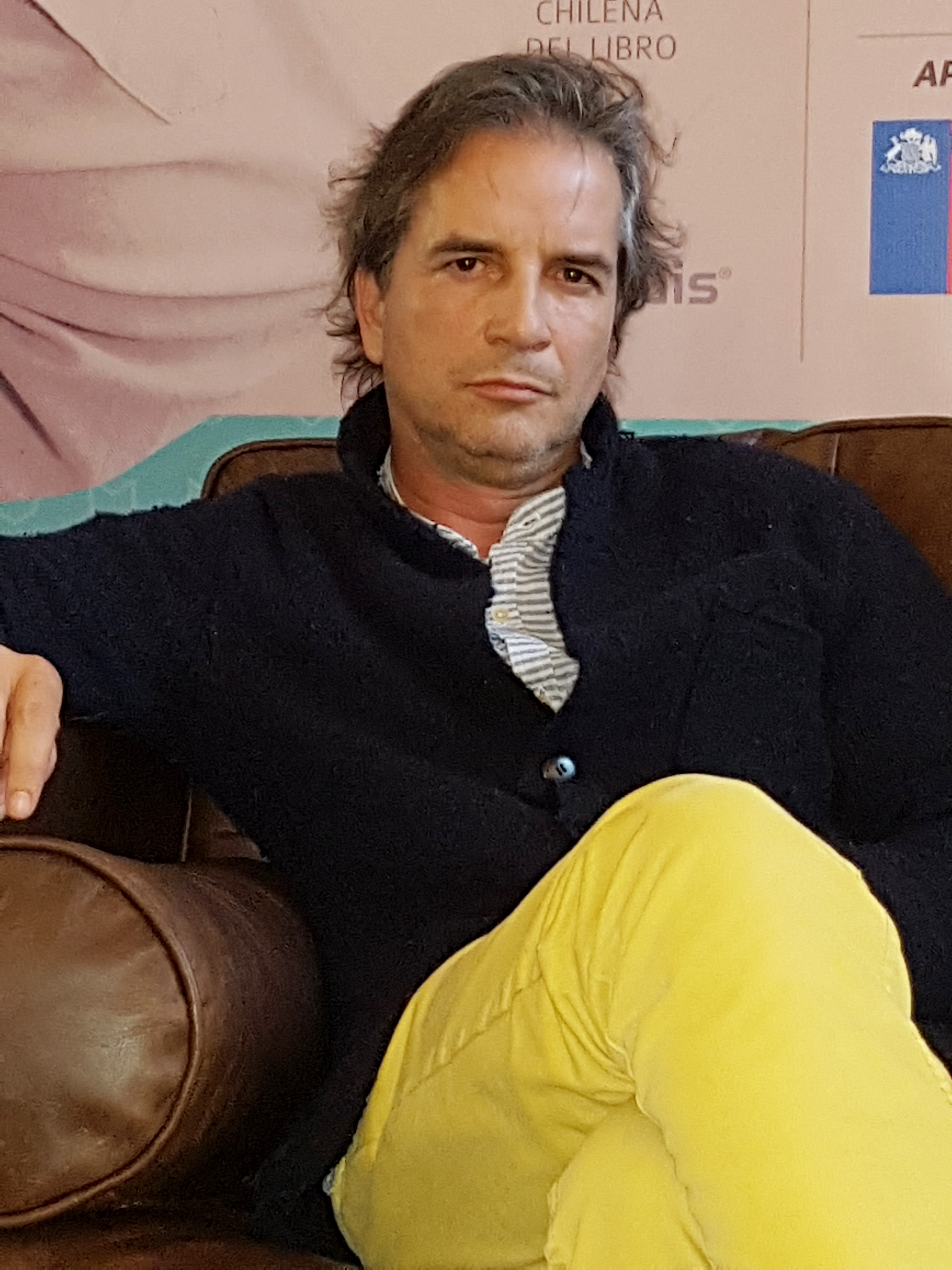 El escritor chileno Pablo Mackenna en la Feria Internacional del Libro de Santiago 2017